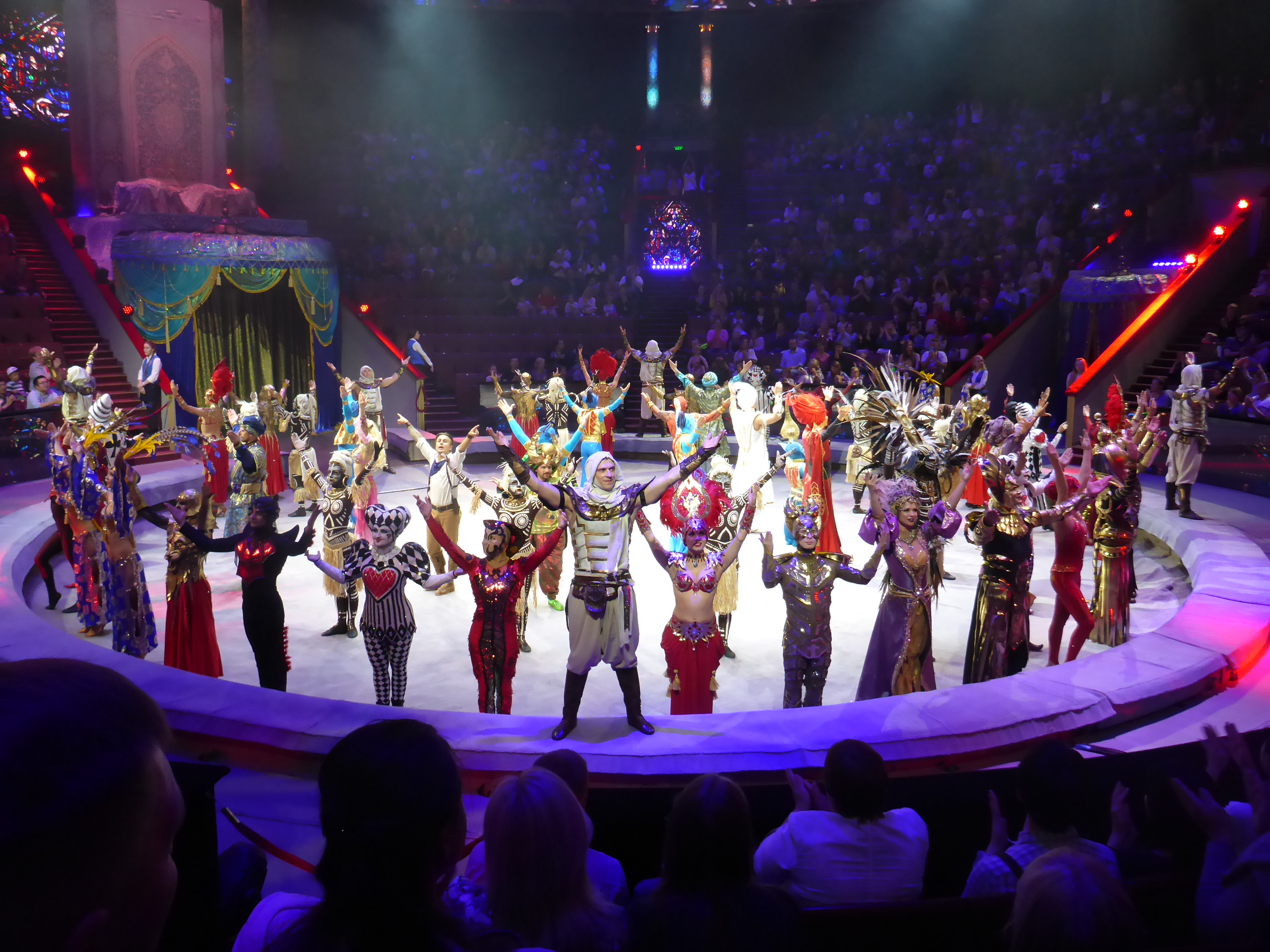 Circo central estatal de Moscú (Rusia), espectáculo "cuento de la Arena" 2019